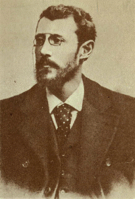 Мишель Верн (1861 - 1925), французский писатель, сын и соавтор Жюля Верна